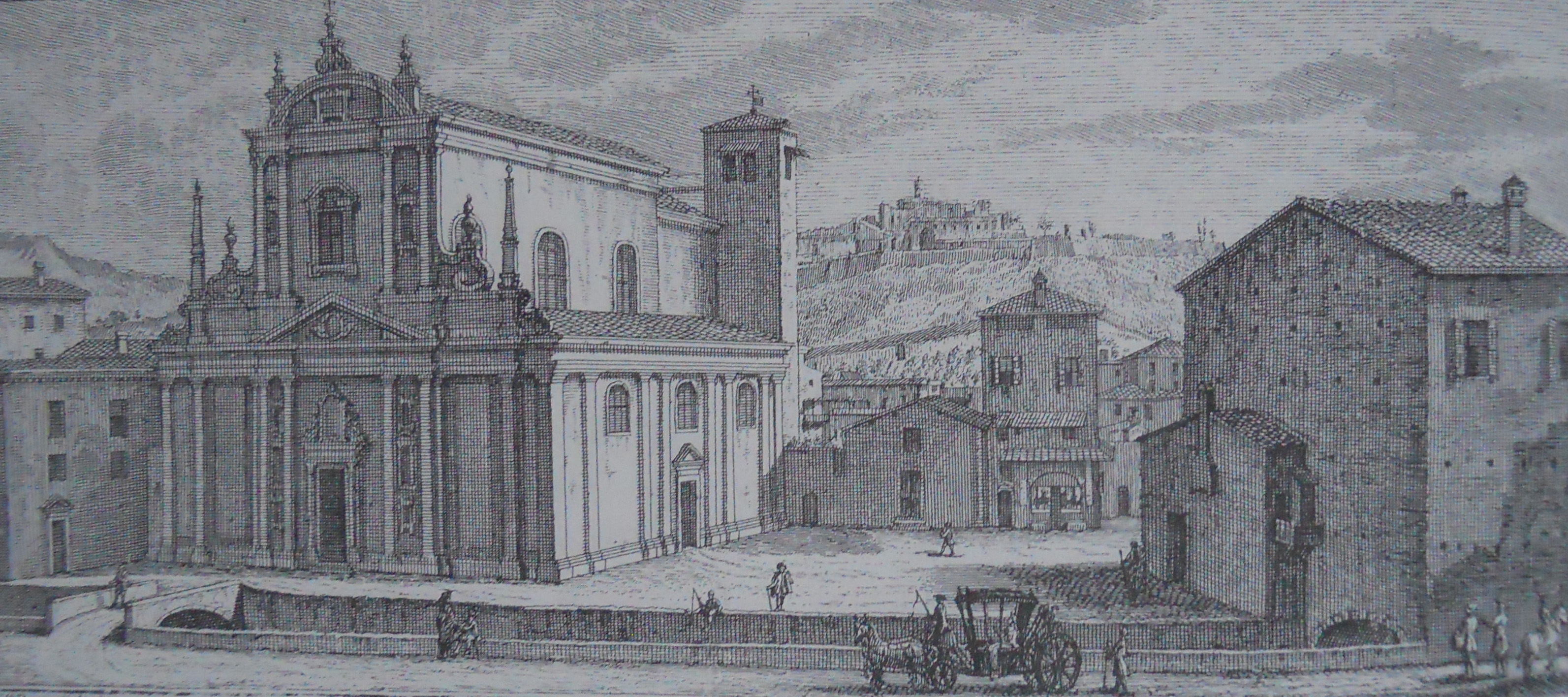 San Faustino maggiore (Brescia), un'incisione del Settecento